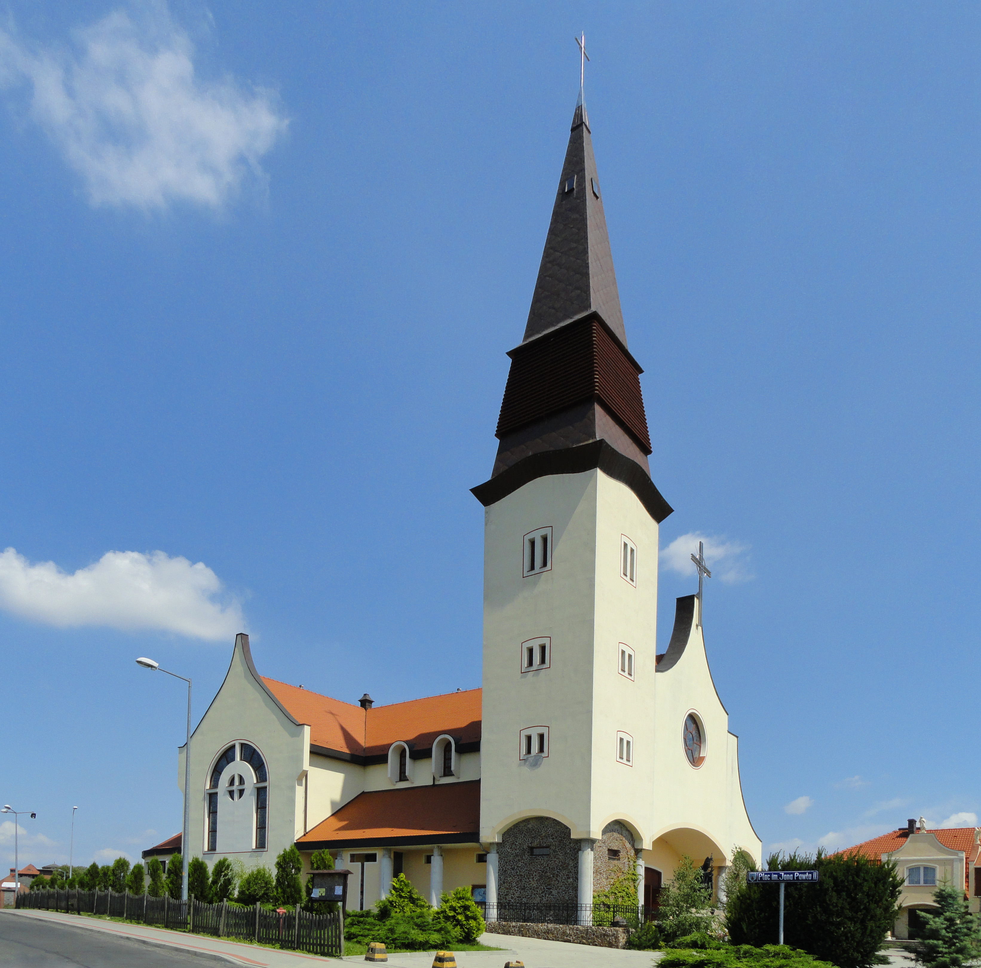 Kościół św. Jadwigi Śląskiej (Hedwigskirche) in Zgorzelec